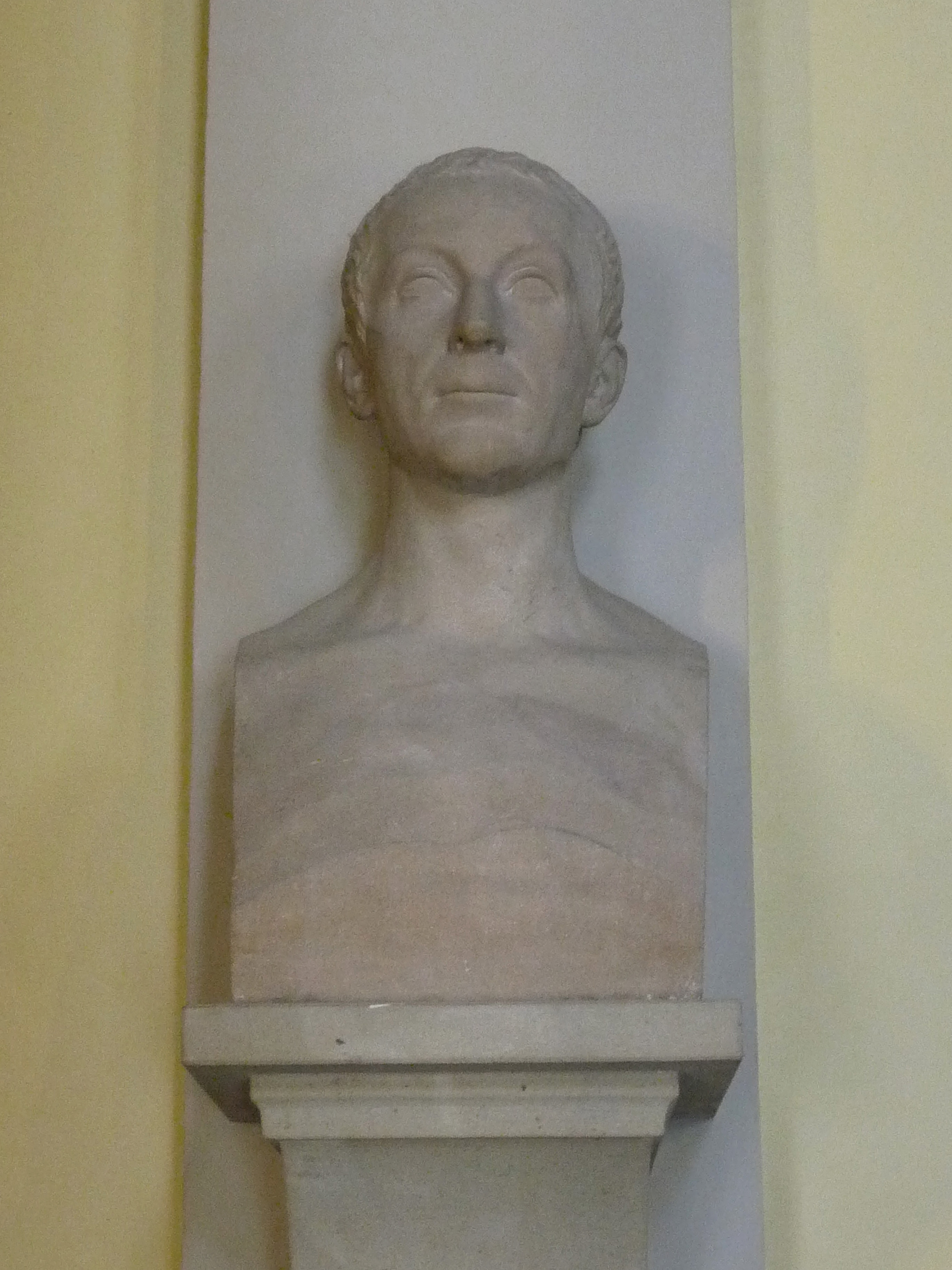 Buste de Jean Hermann (XIXe siècle) au Musée zoologique de Strasbourg. "JOHANNES HERMANN IN ACADEMIA ARGENT. PROFESSOR MUSEI HUIUS CONDITOR. MDCCCXXVII"